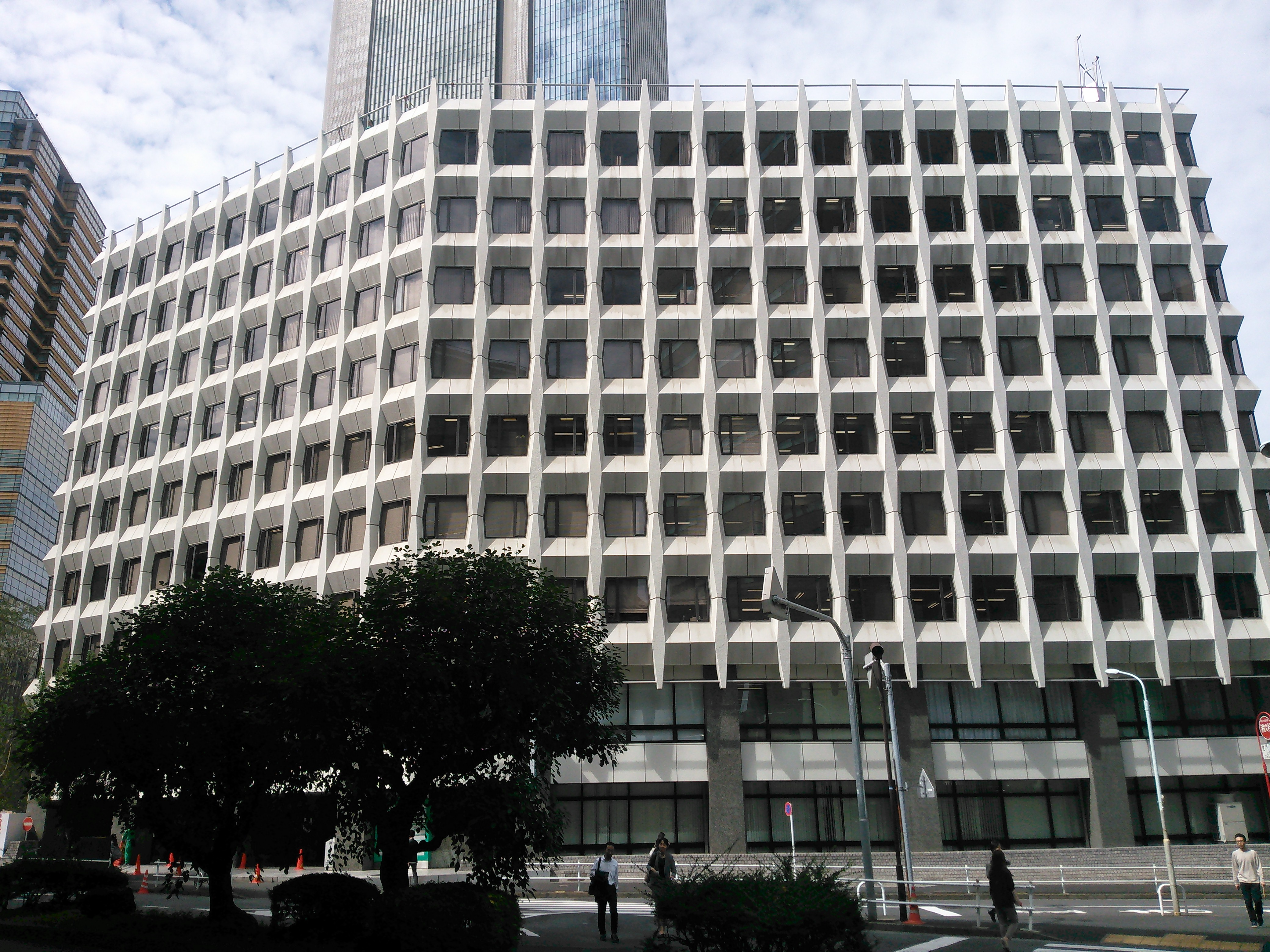 東京都港区赤坂、三会堂ビル